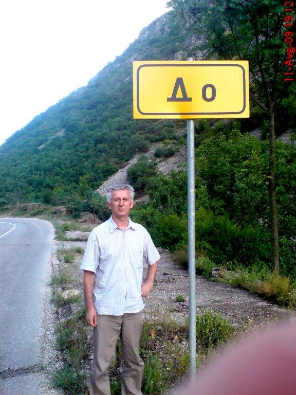 Do (Trebinje), tabla na ulazu u selo, do table Slavko Bovan